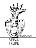 Logótipo SEIVA TRUPE - Teatro Vivo